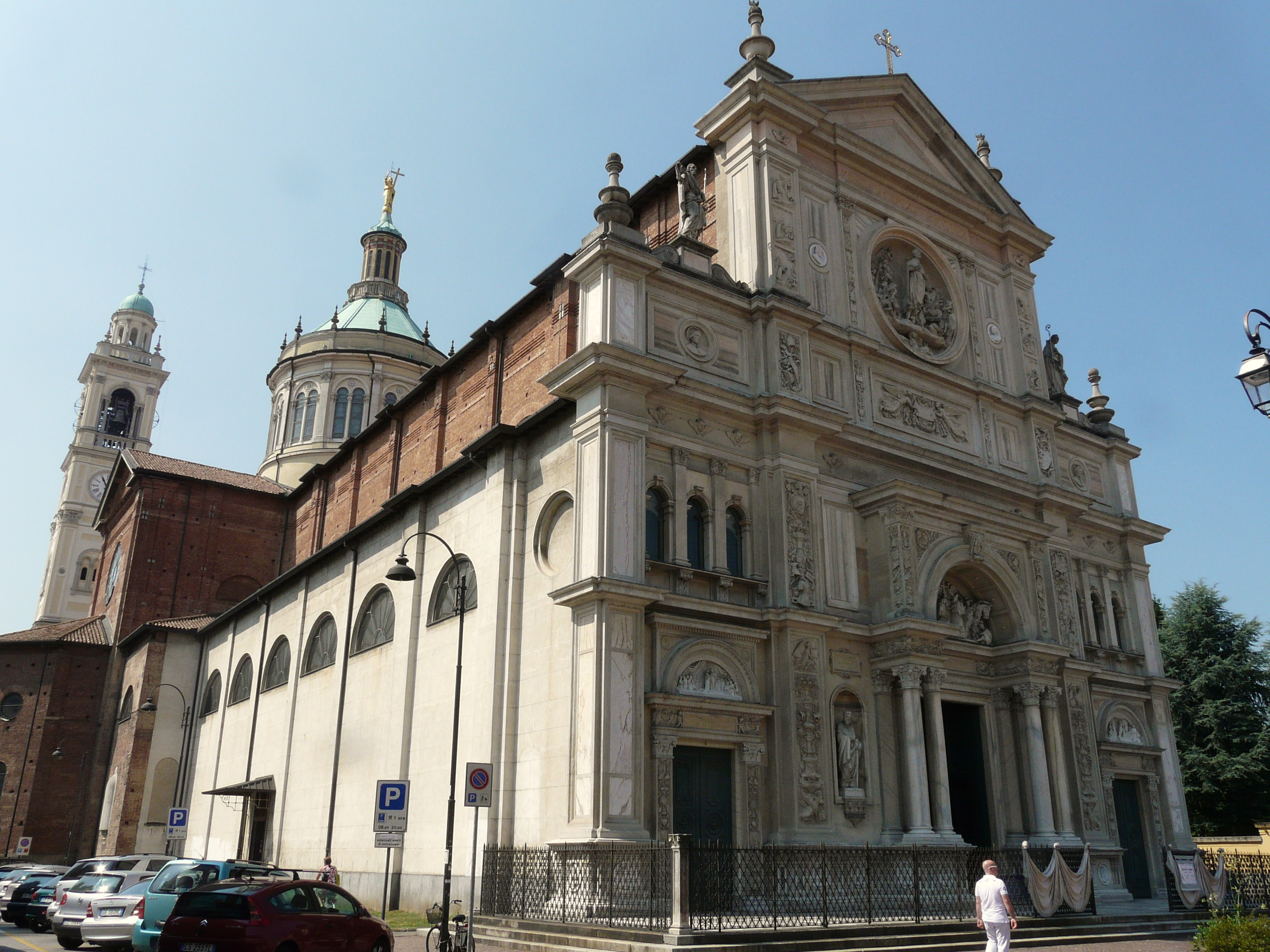 Chiesa di San Martino, Magenta, Lombardia, Italia